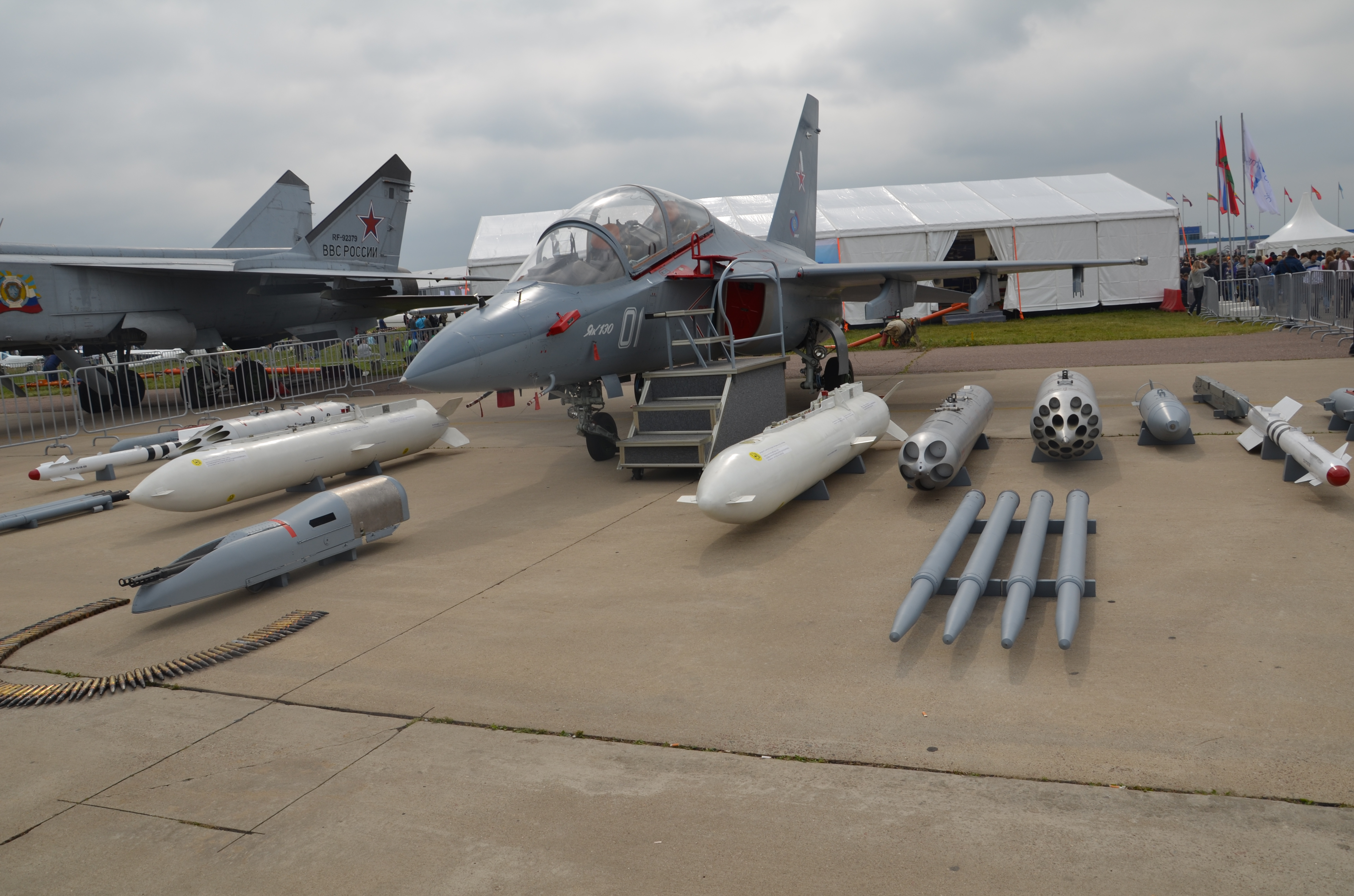 MAKS Airshow 2013